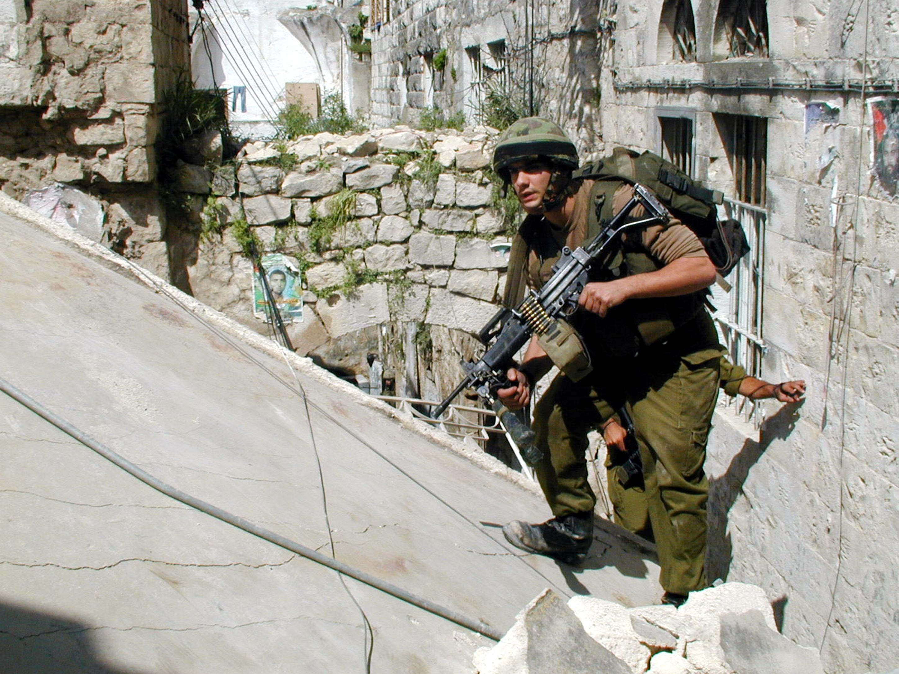 מבצע "חומת מגן" להריסת תשתיות הטרור ברשות הפלשתינית על ידי כוחות צה"ל בג'נין. בצילום, חיילי צה"ל בפעילות מבצעית בג'נין.